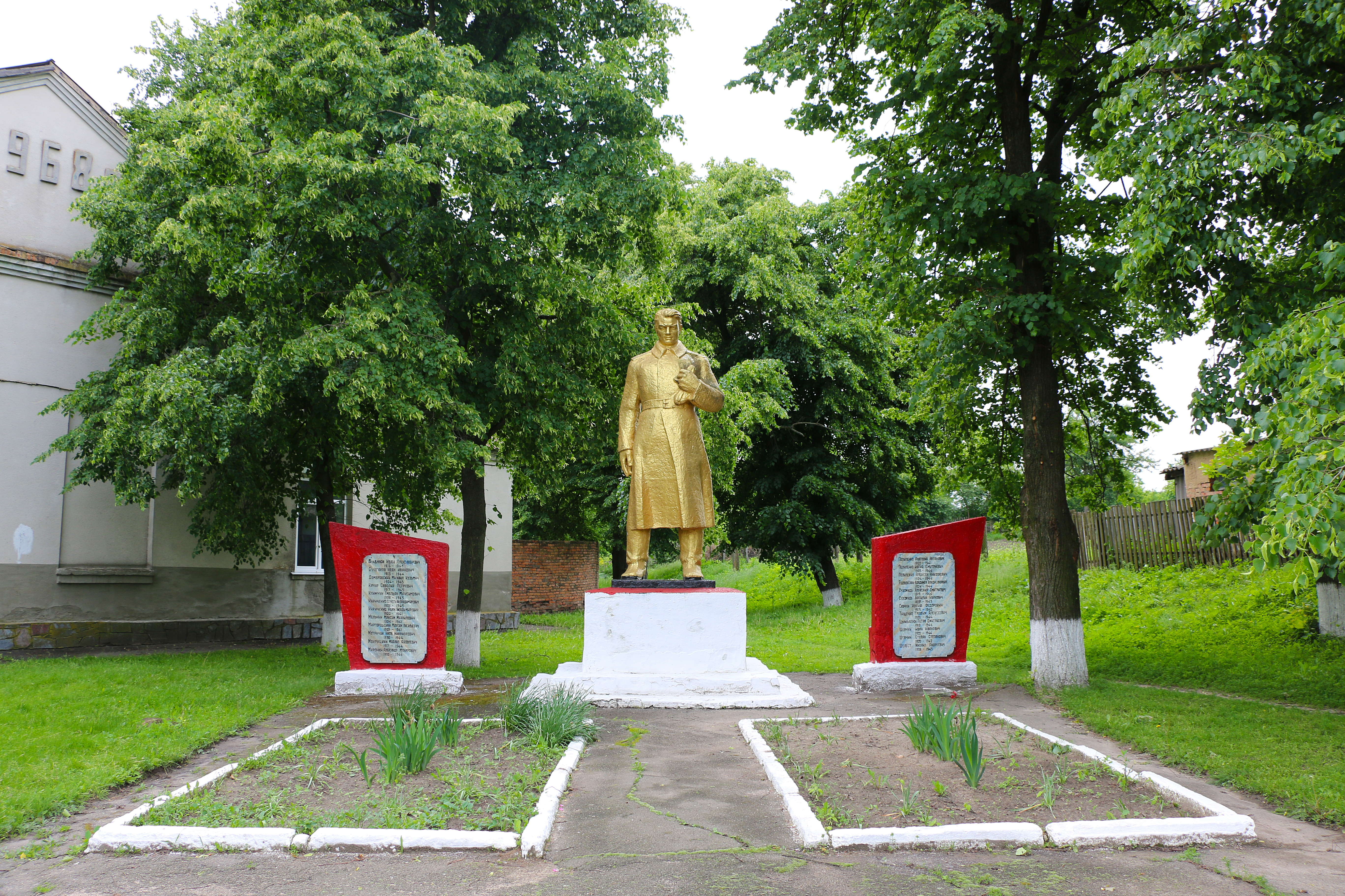 Пам’ятник 24 воїнам – односельчанам, загиблим на фронтах ВВВ, Сорока, біля Будинку культури